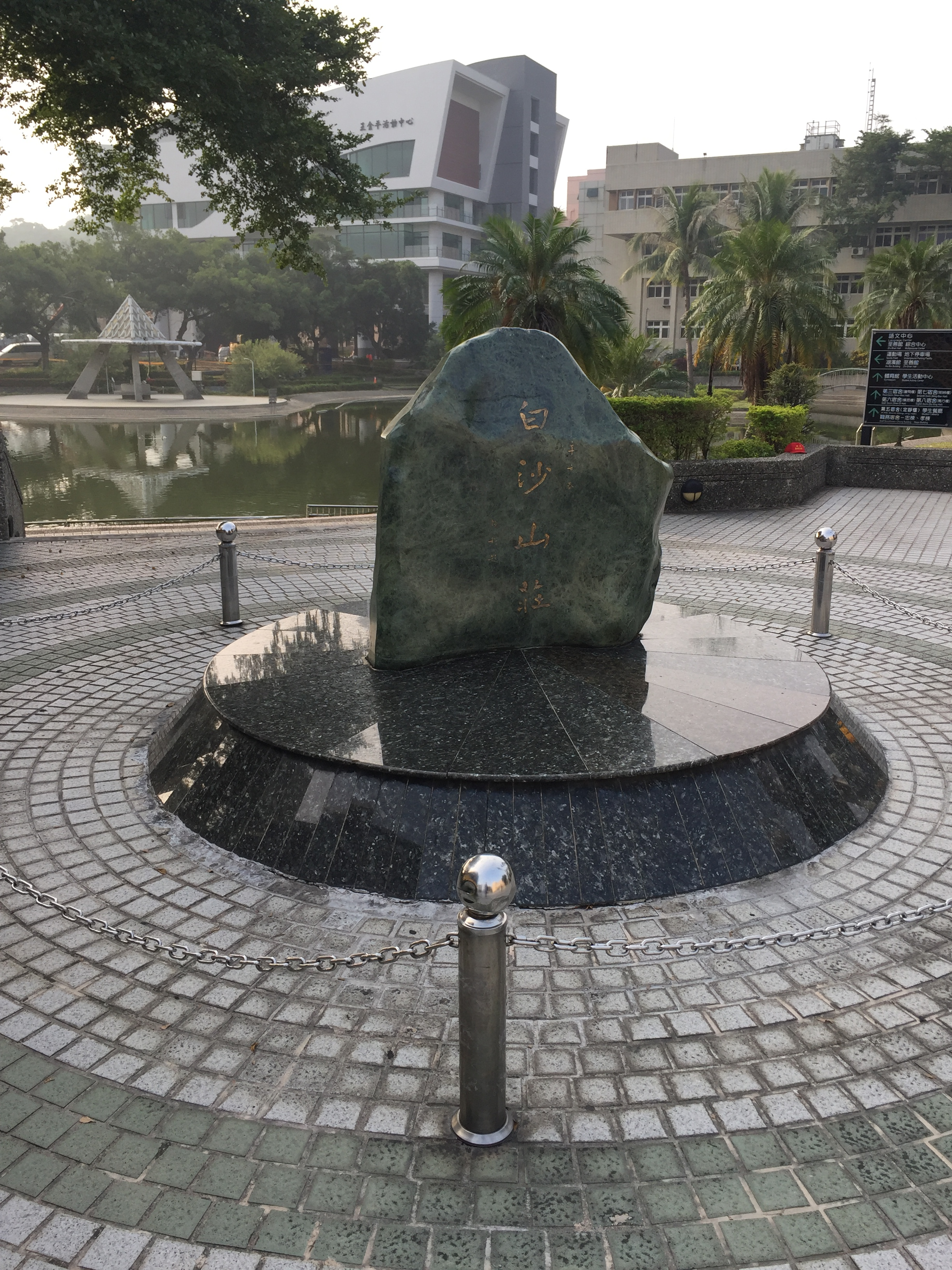 彰師大進德校區白沙山莊石碑